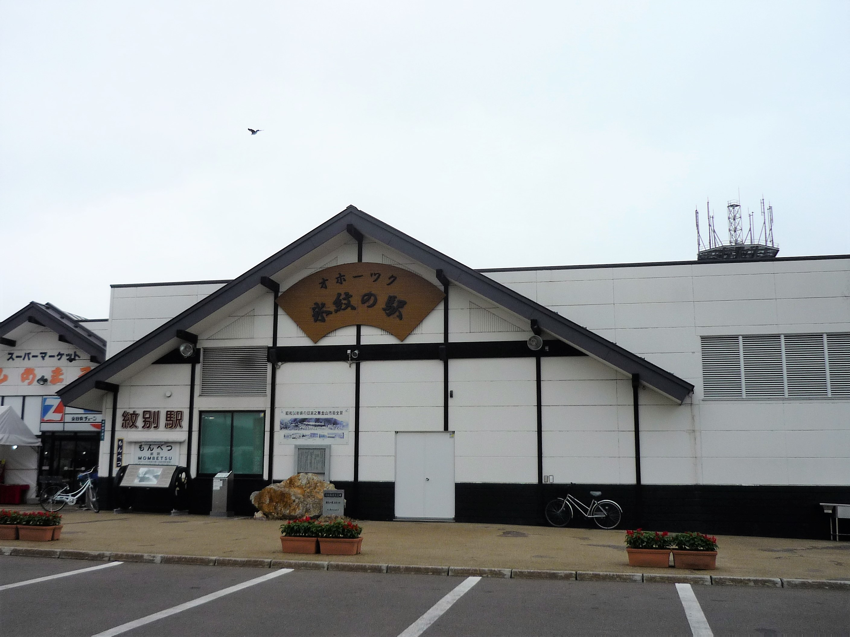 オホーツク氷紋の駅（紋別駅跡）